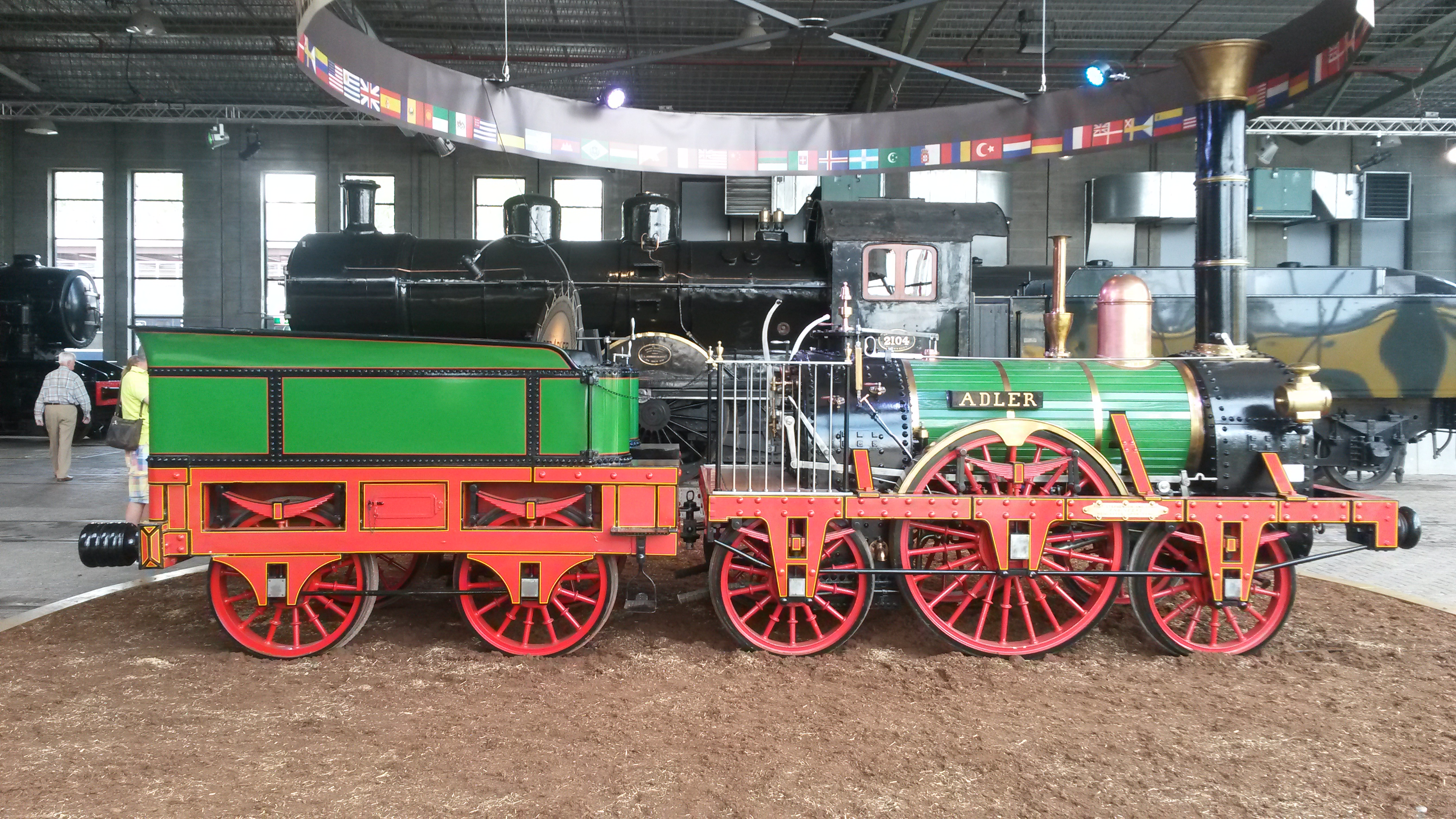 De Adler in het Nederlands Spoorwegmuseum in Utrecht